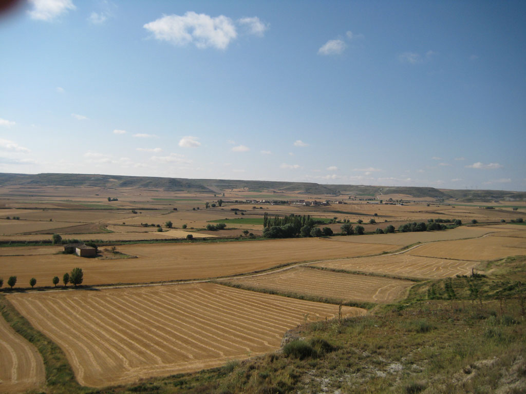 Hochebene bei Castrojeriz